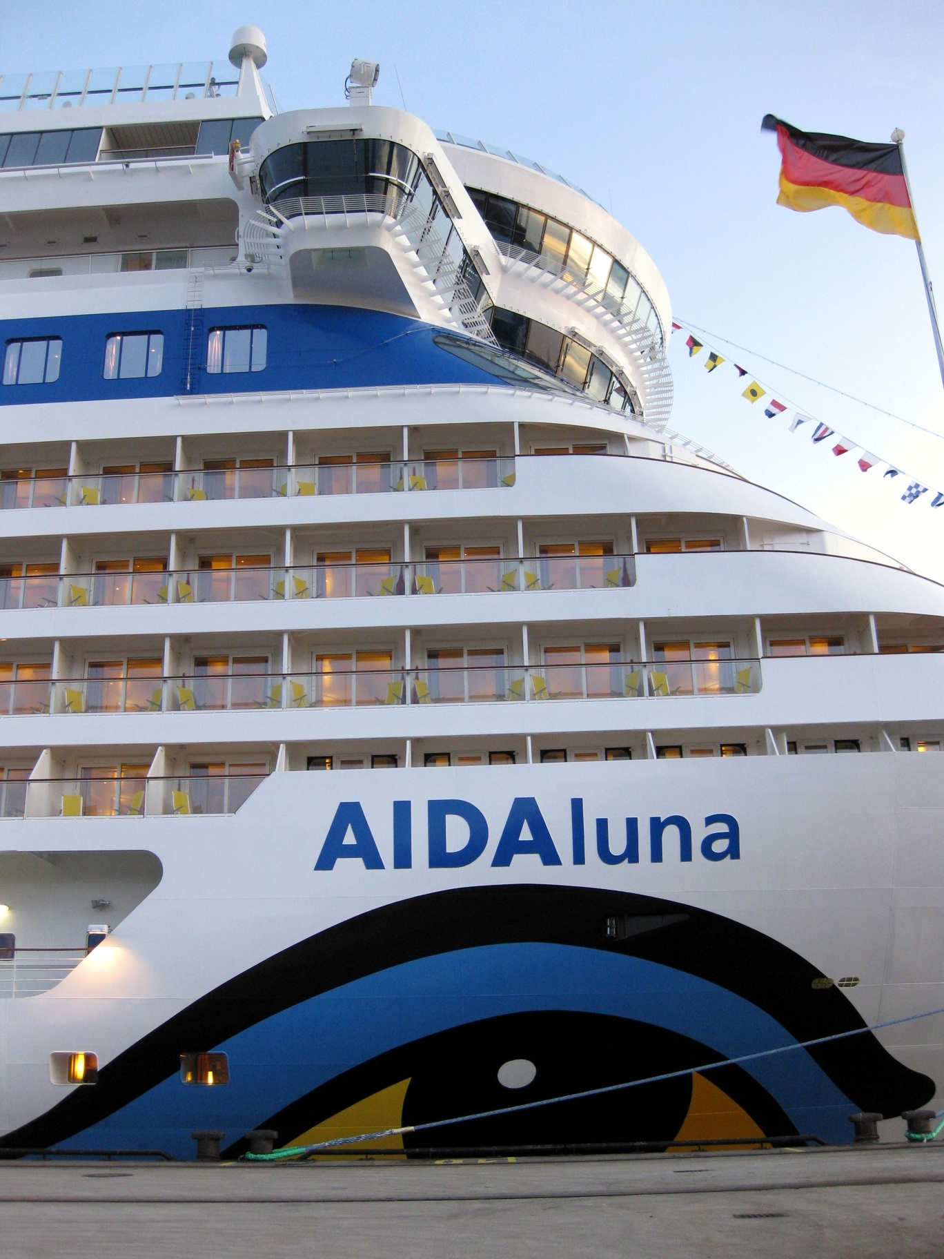 AIDAluna am Kreuzfahrtterminal in der Hamburger HafenCity - Namenszug